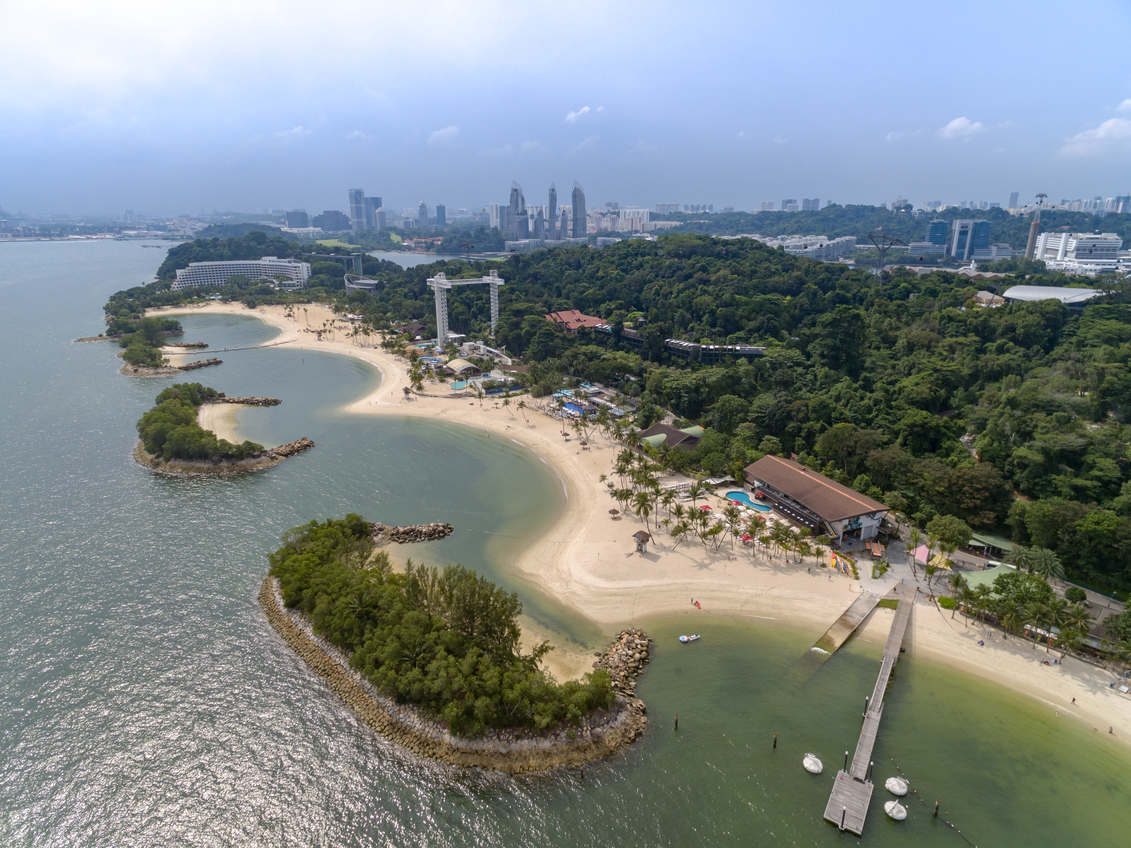 Siloso Beach Sentosa Singapore Singapur Singapore Luftbild aerial